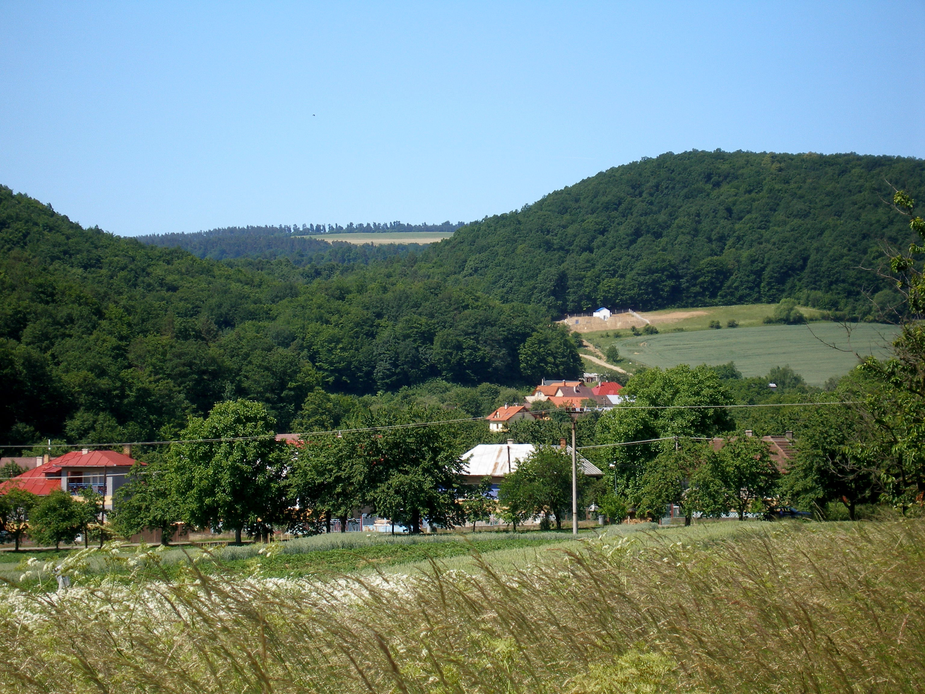 Obec Uzovský Šalgov okres Sabinov